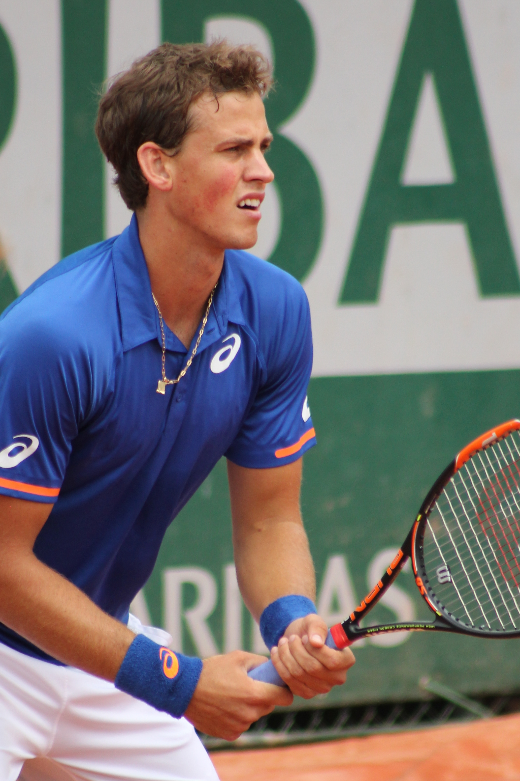 Pospisil RG15 (8)